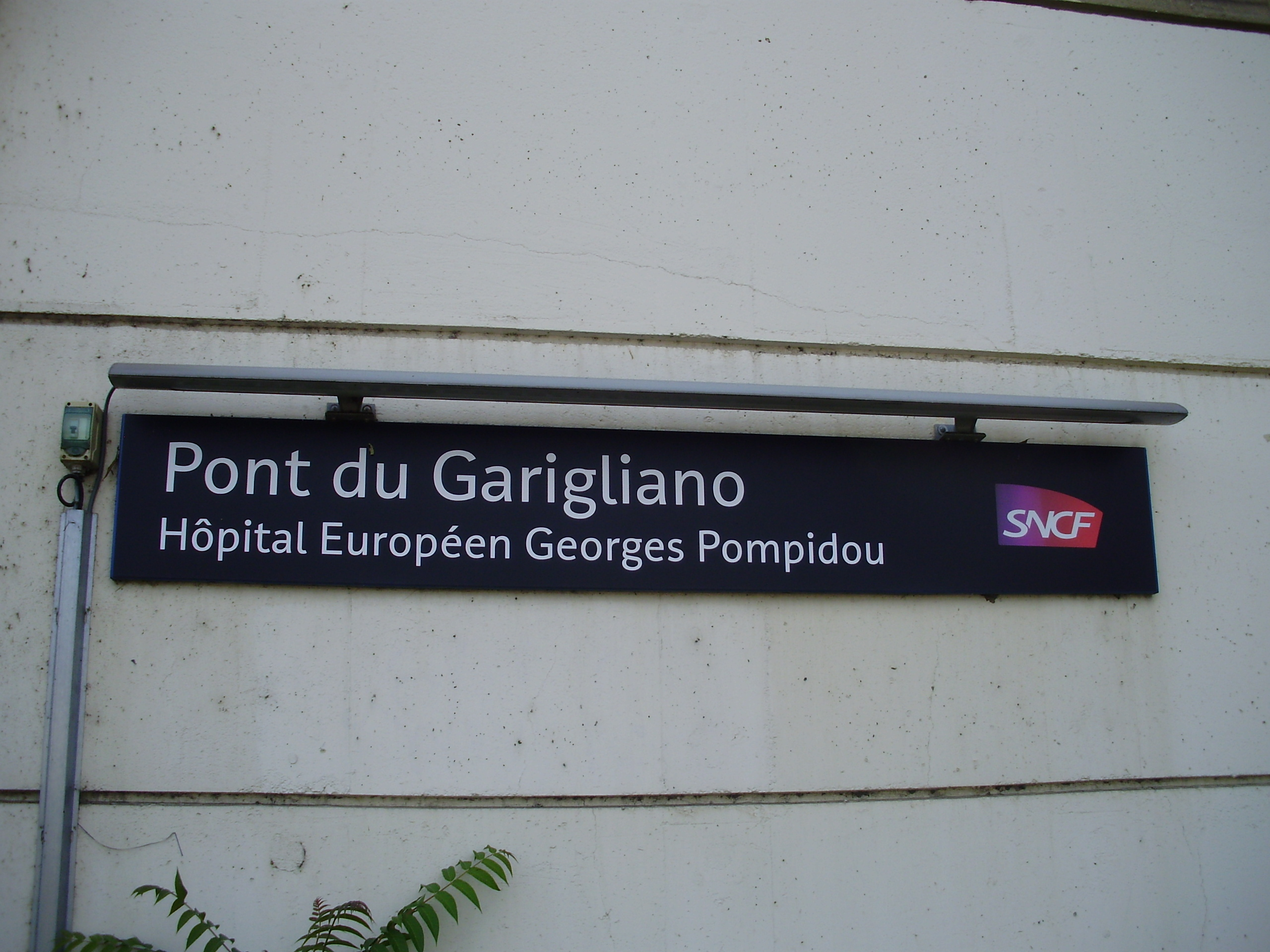 Gare du Pont du Garigliano, à Paris 15e, France : plaque signalétique portant le nom de la gare.